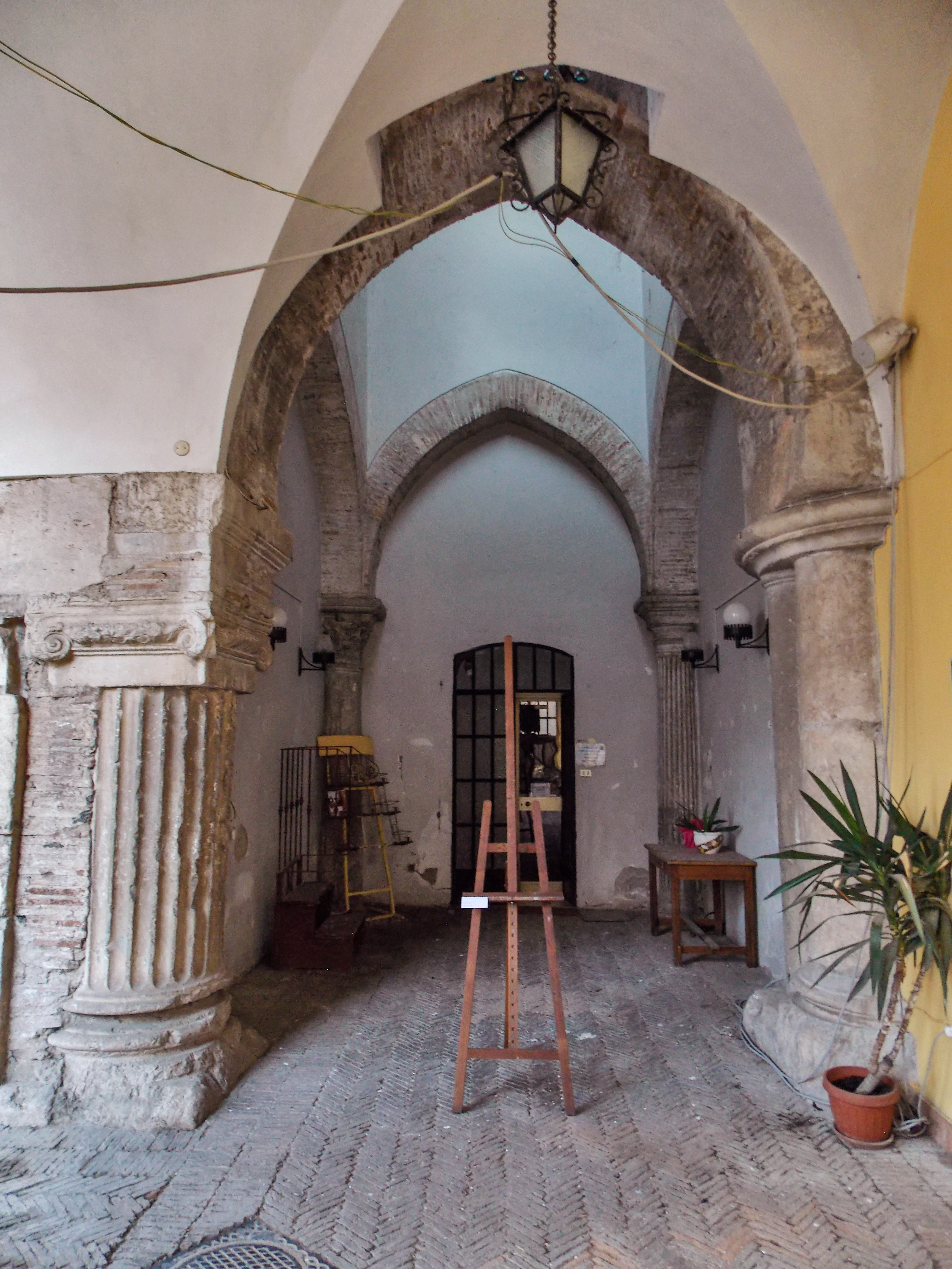 Convento di San Francesco di Benevento. Base del campanile